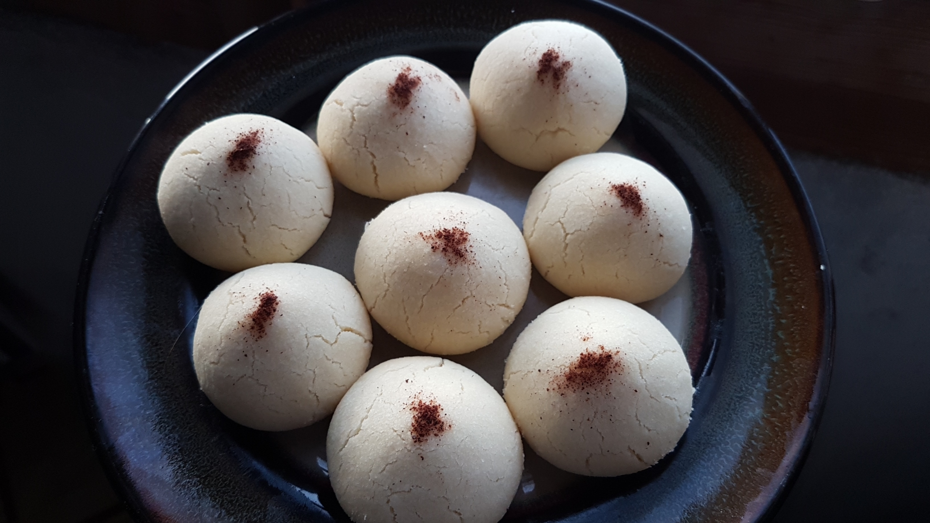 Un gâteau traditionnel algérien